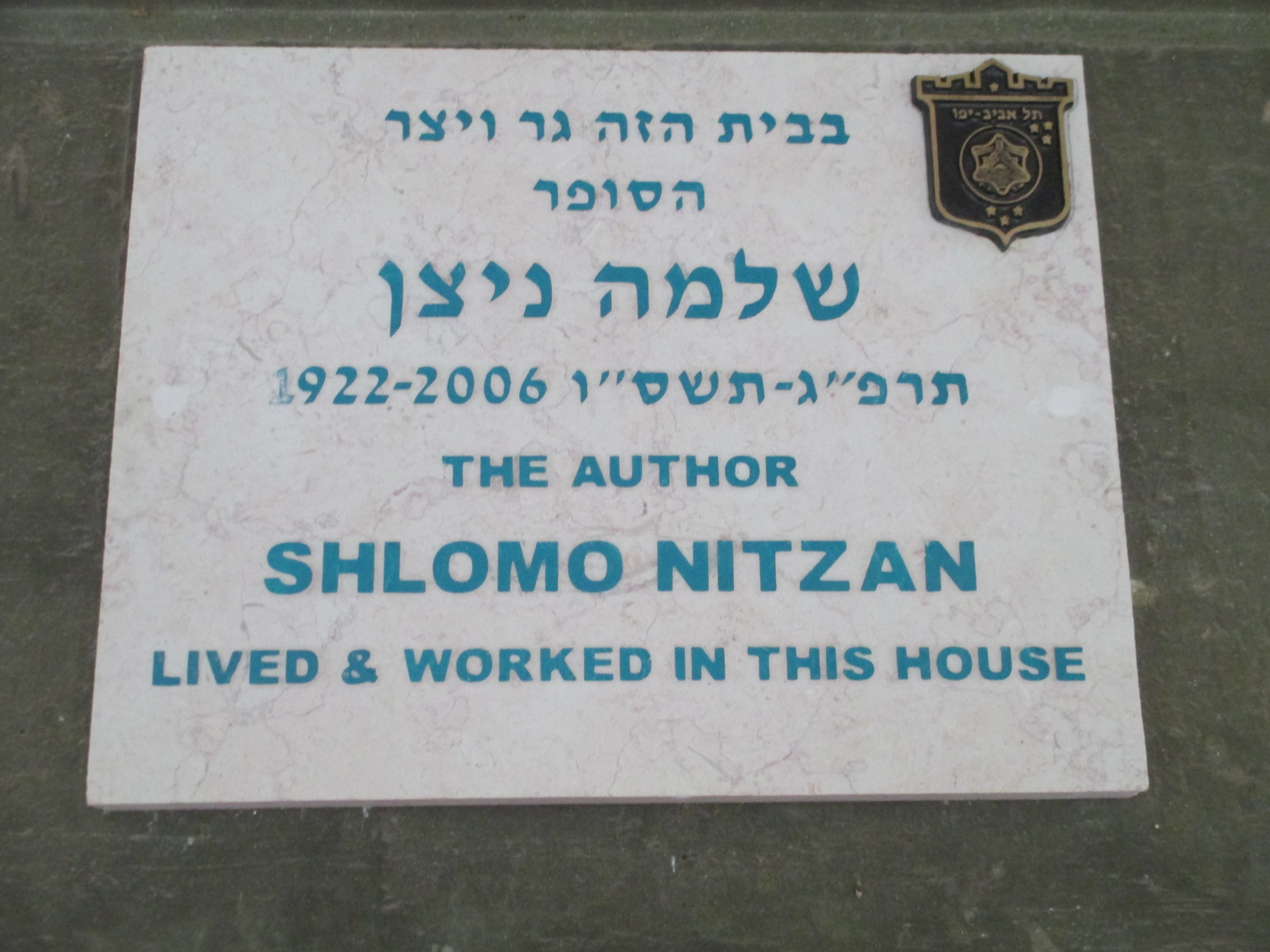 לוחית זיכרון לסופר שלמה ניצן בכניסה לביתו ברח' הפלמ"ח 13 בתל אביב